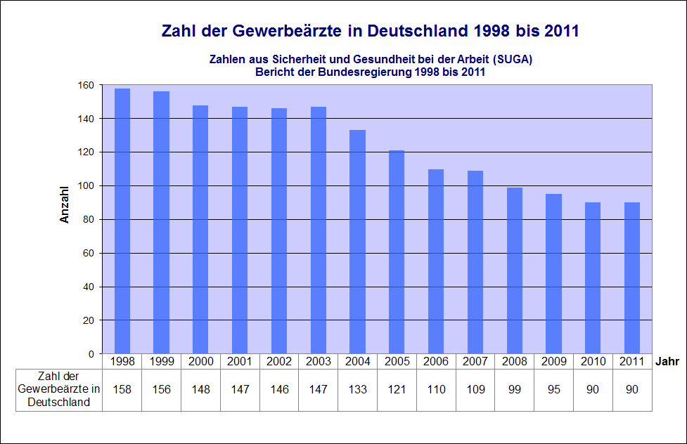 Grafik Statistik Gewerbeaerzte